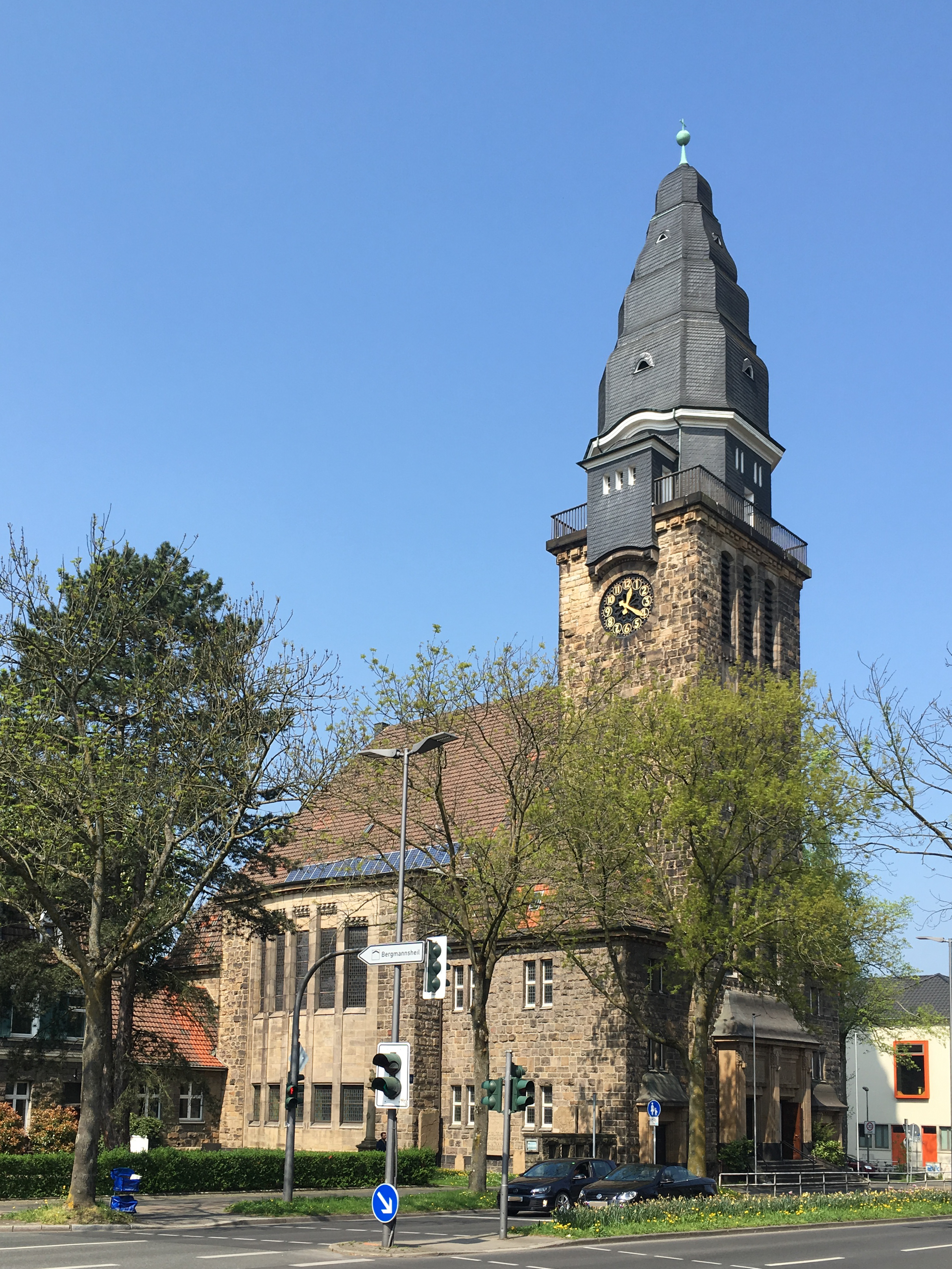 Südseite der evangelischen Melanchthonkirche an der Königsallee in Bochum